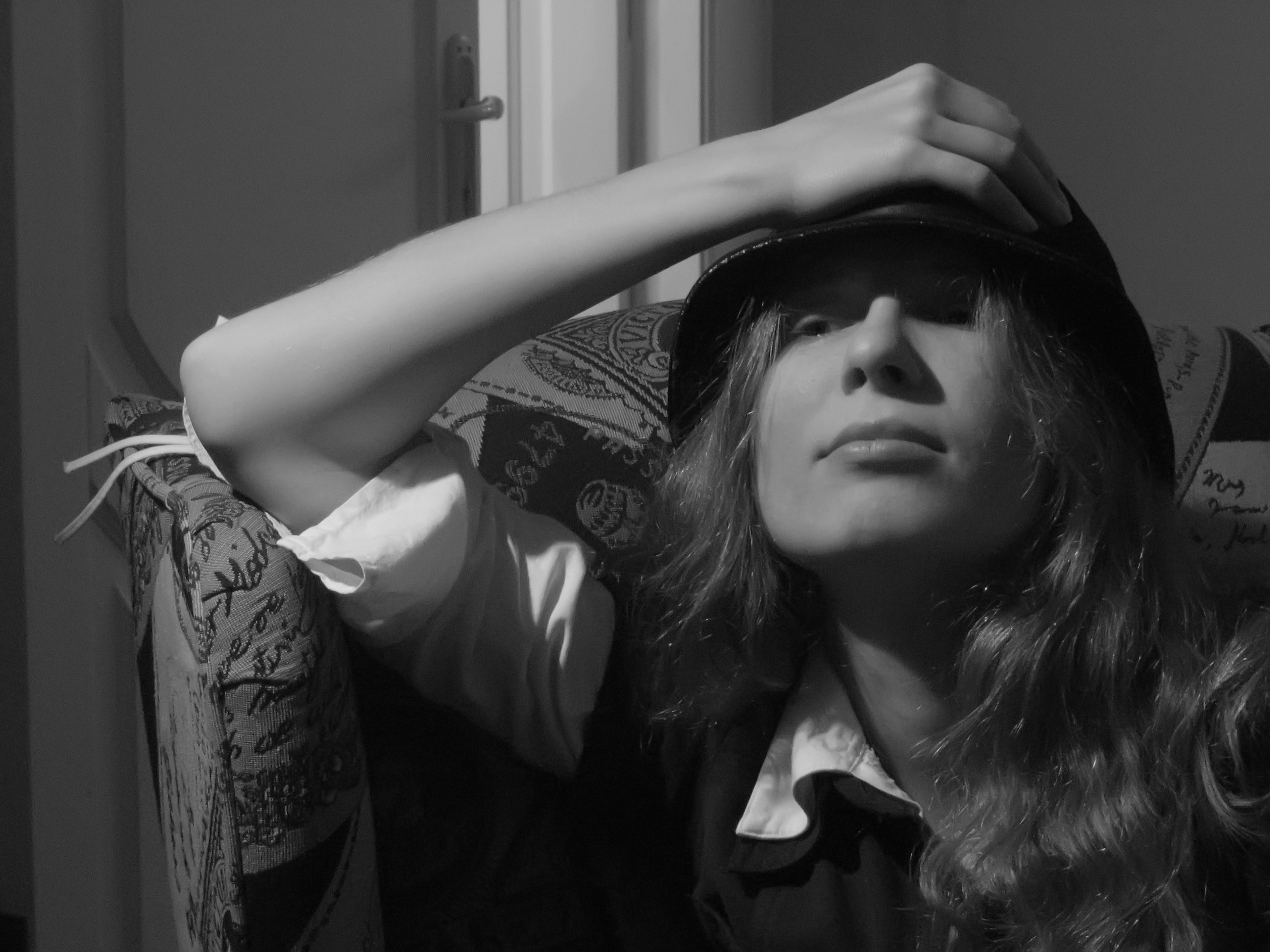 Марина Соколян